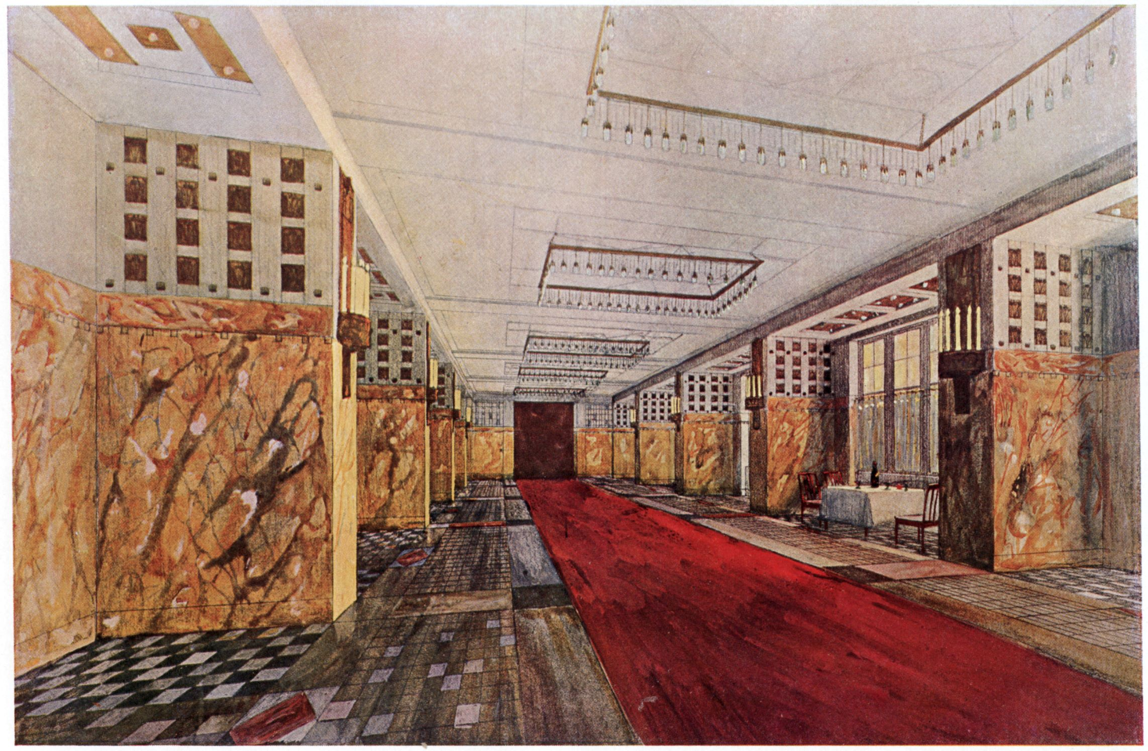 Berlin - Weinhaus Rheingold, Entwurf des Onyxsaals von Bruno Schmitz